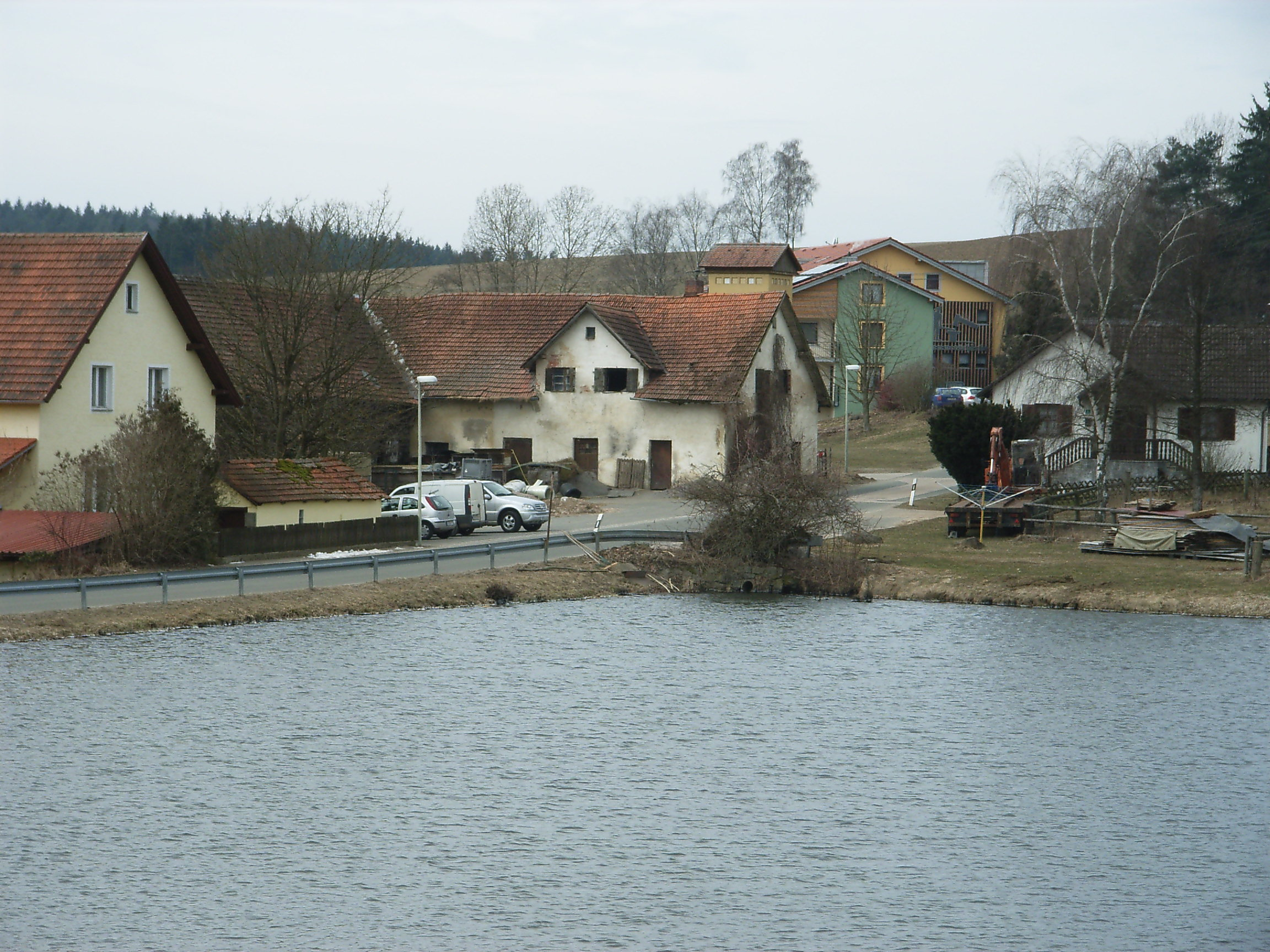 Lukahammer